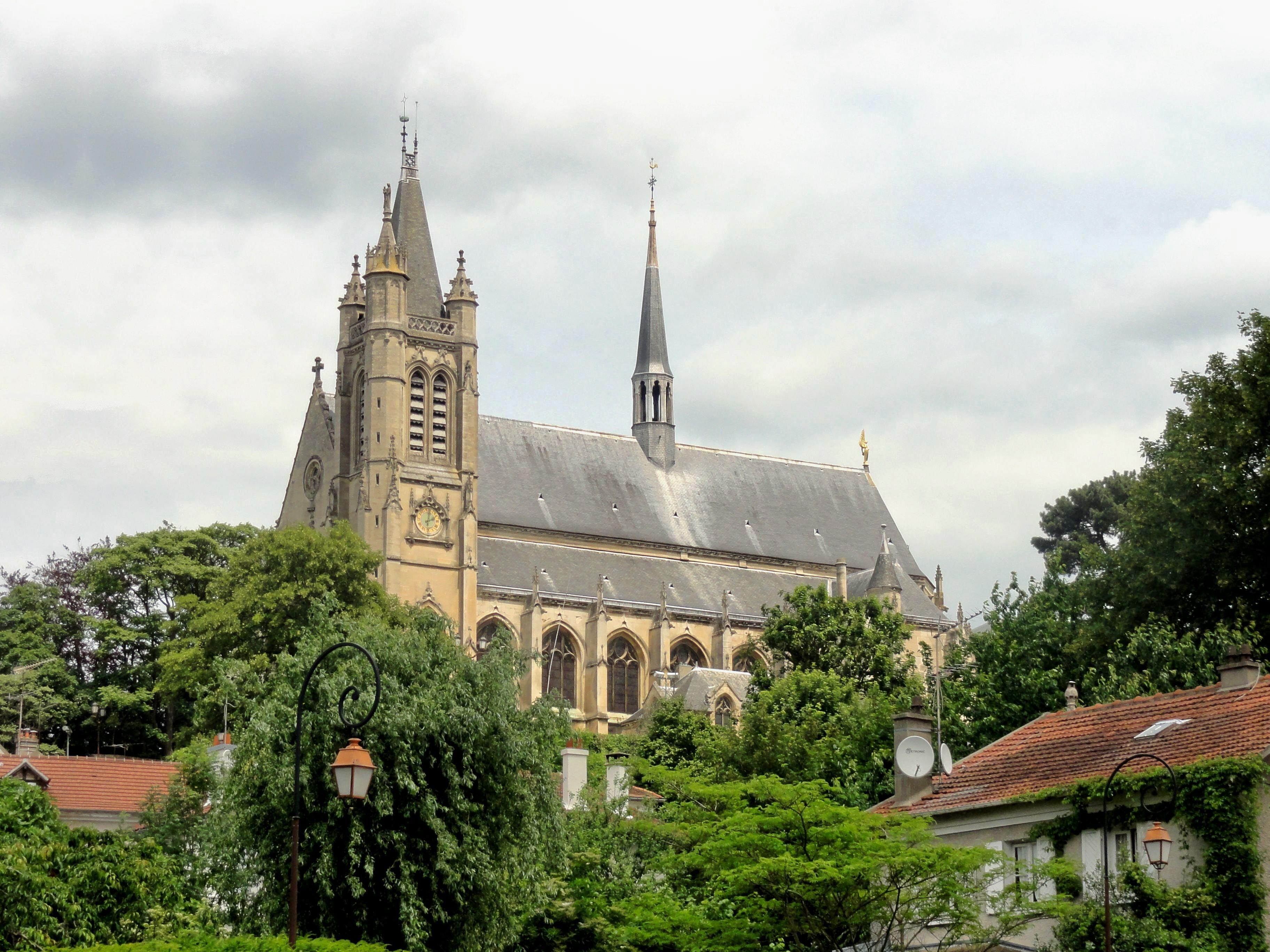 Collégiale Saint-Martin, vue depuis l'avenue du Lac au sud-ouest.